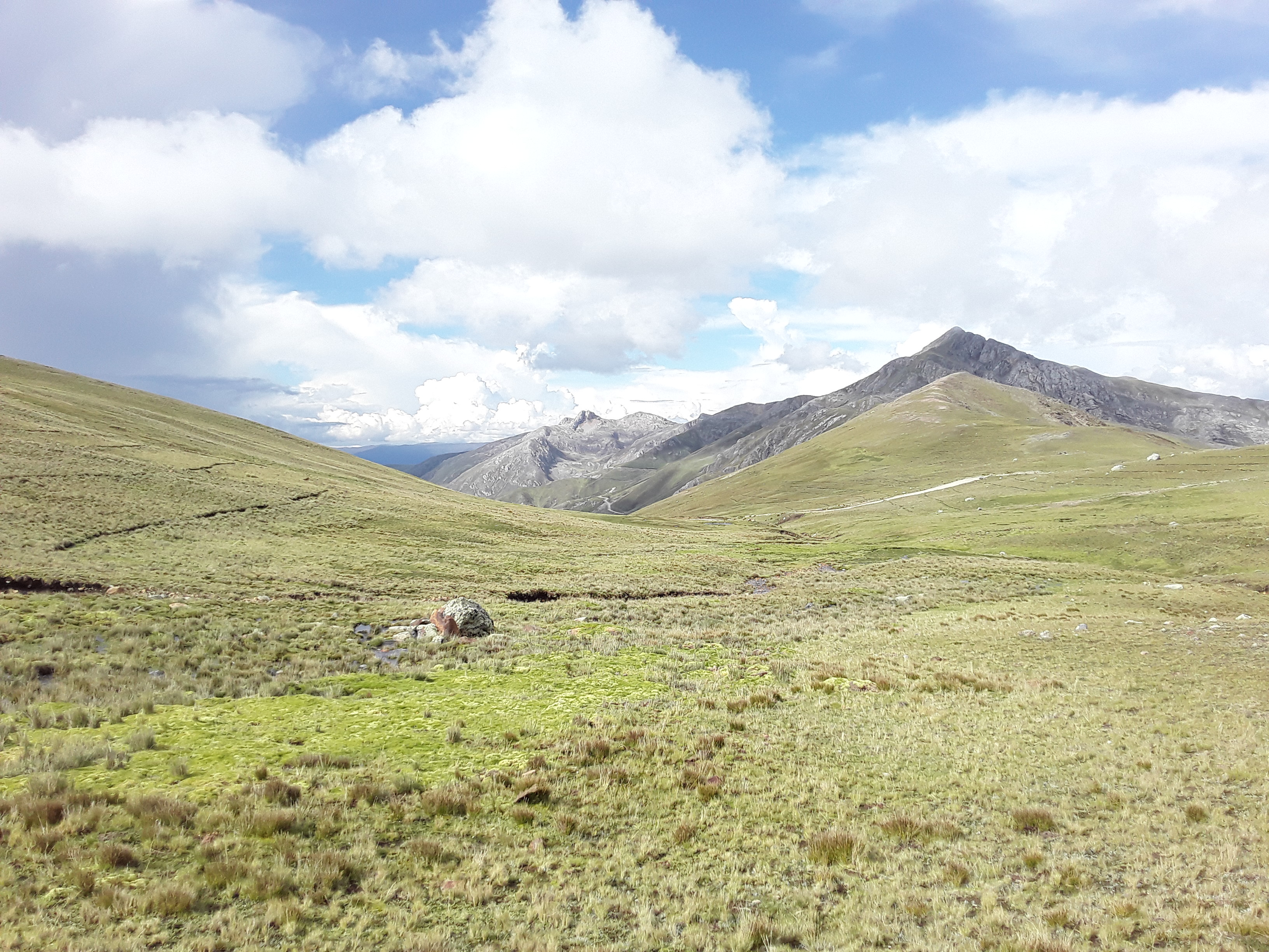 Alturas de Hualla